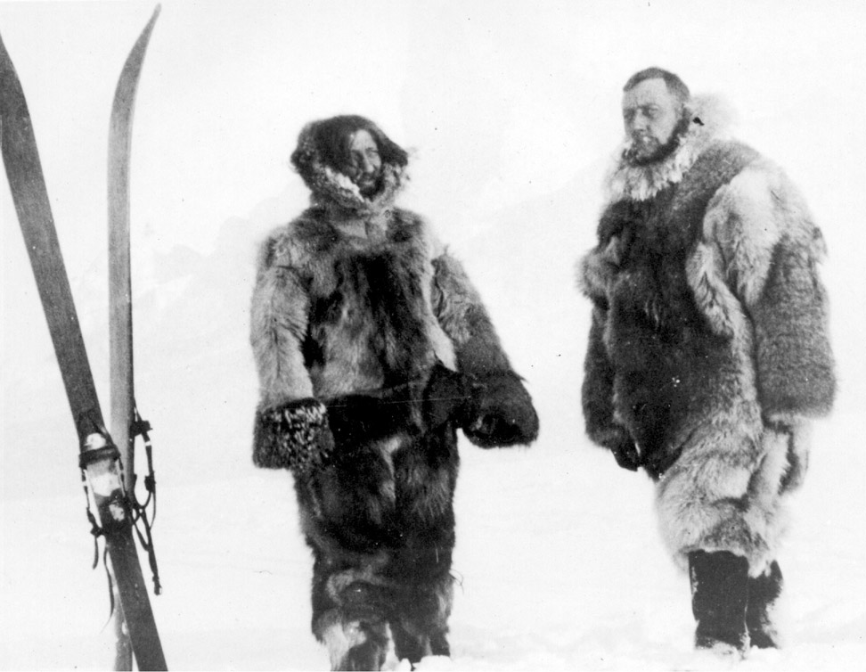 Copok e Amundsen in Antartide. Due ottimi amici.